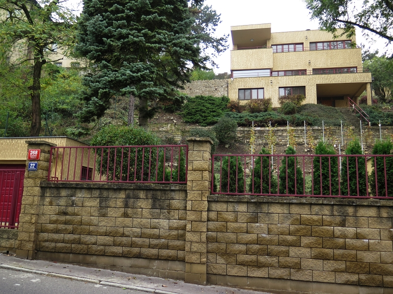 Vila Barrandovská 22, Barrandovská 268/22, Barrandov.